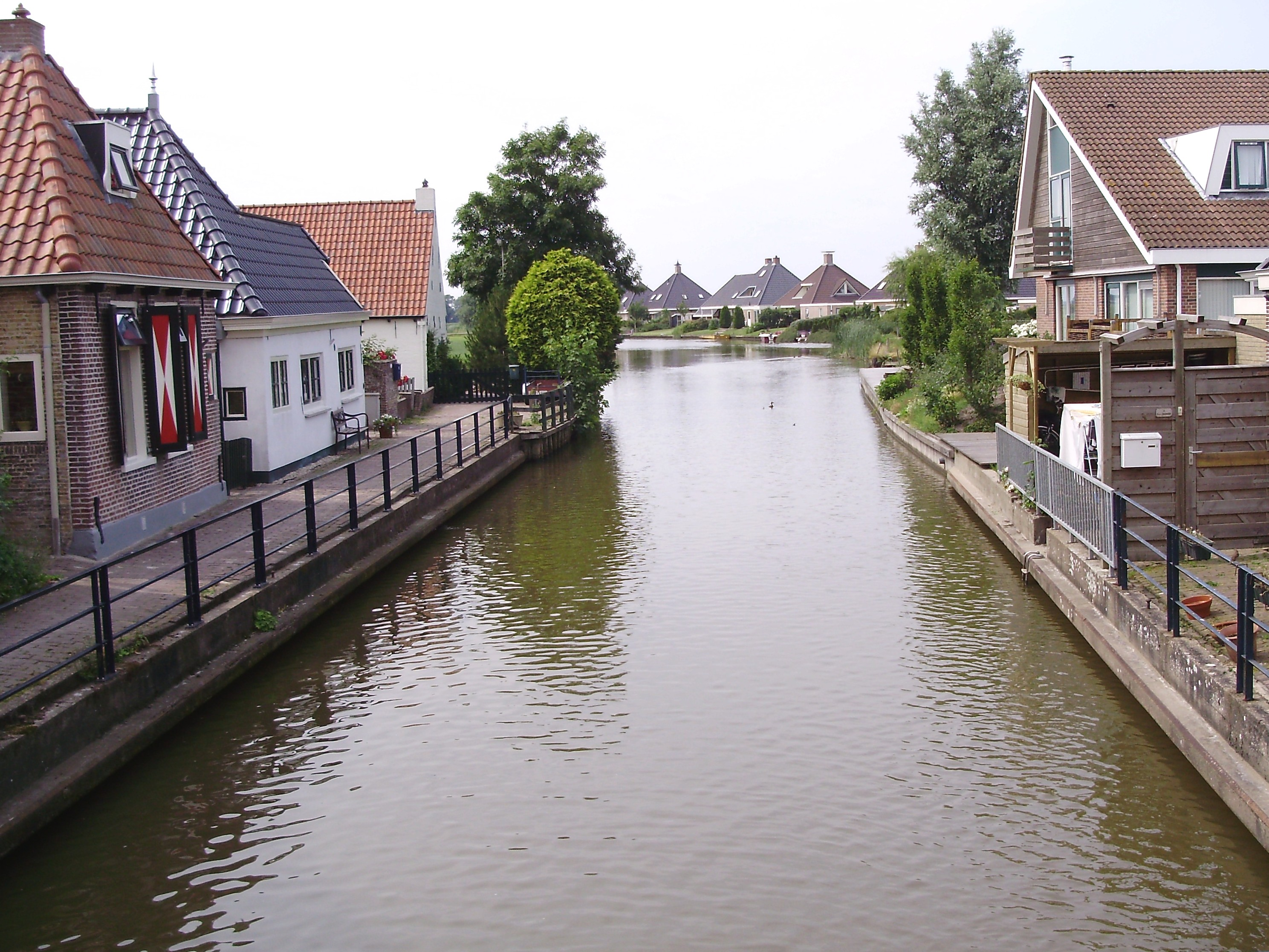 De Franekervaart in Winsum, in gemeente Littenseradeel (provincie Friesland, Nederland)